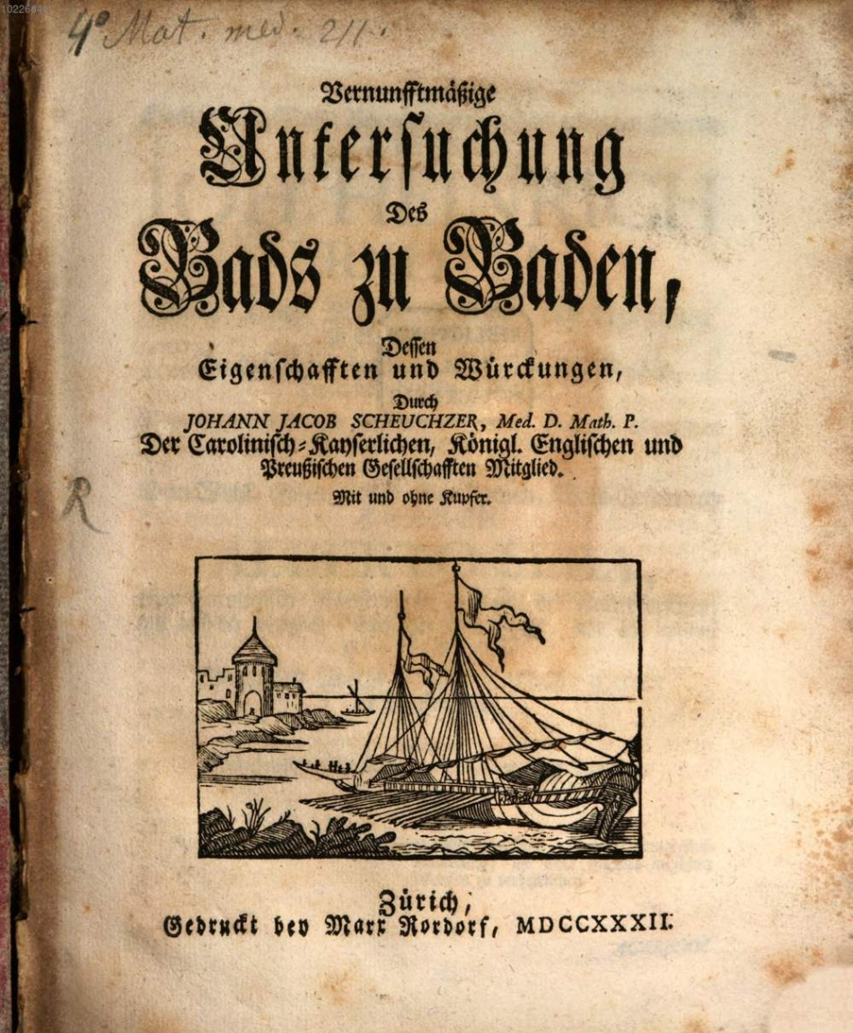 Titelblatt des Buchs «Vernunfftmäßige Untersuchung des Bads zu Baden» von Johann Jakob Scheuchzer.